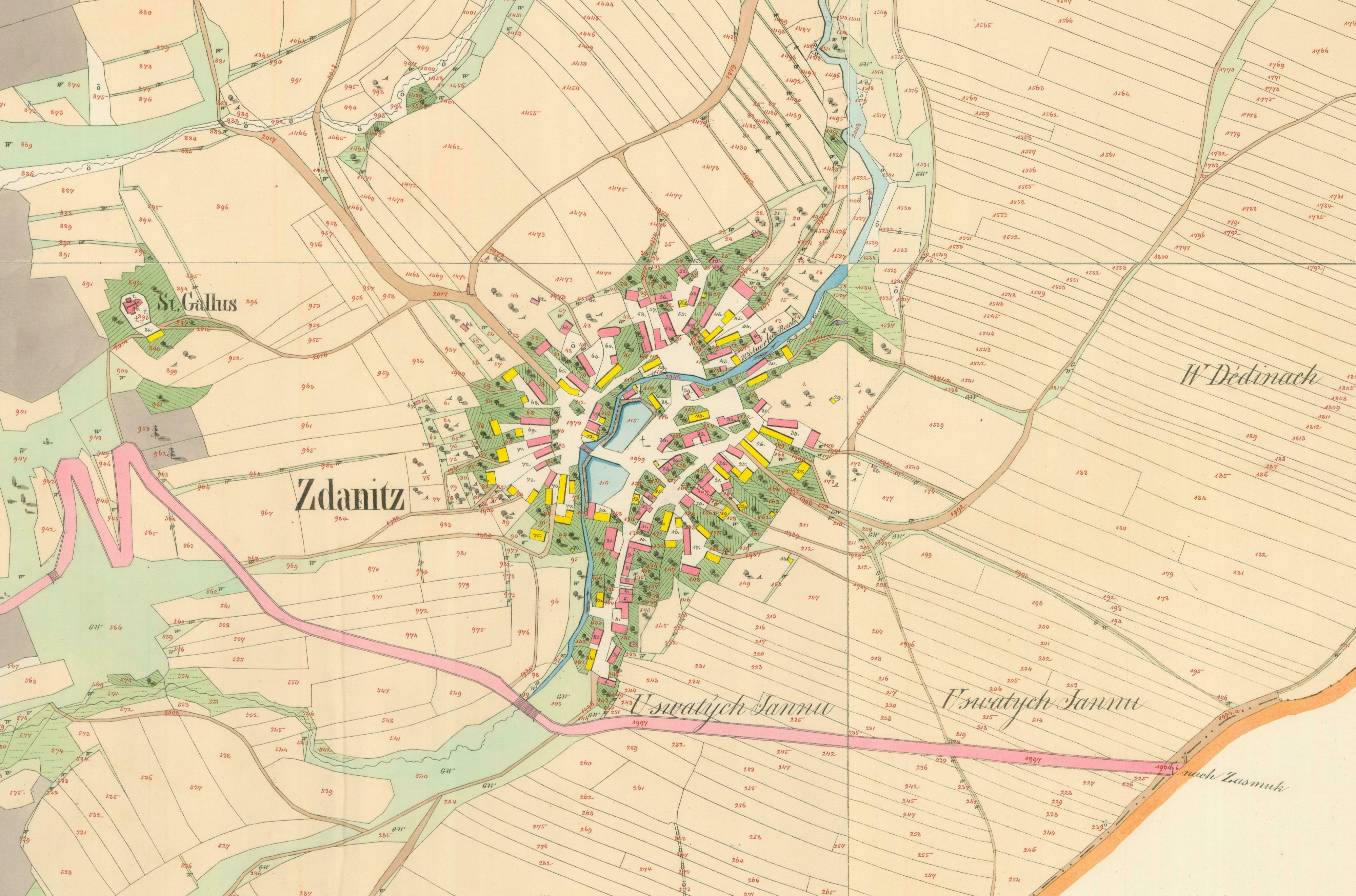 Ždánice na císařských otiscích mapy stabilního katastru